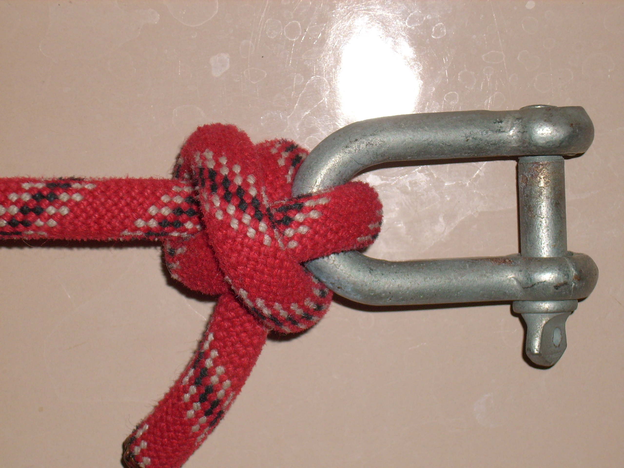 Gordingstek - halber Schlag aussen